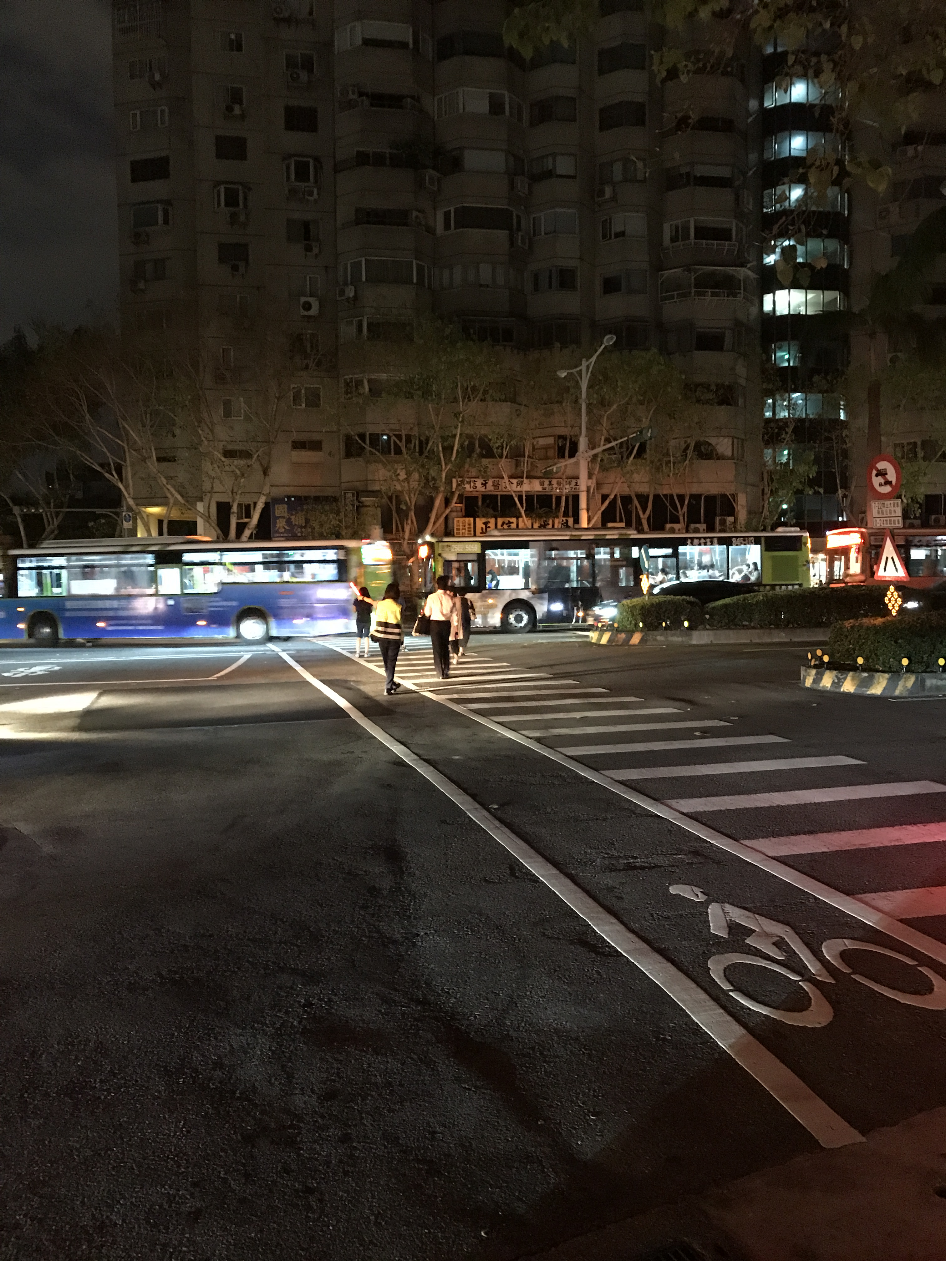 中文（台灣）: 停電中，臺北市政府警察局交通警察在臺北市松山區民生東路五段與三民路口管制交通、維持治安。